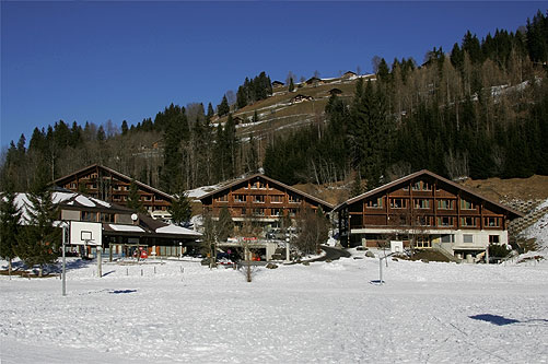 Kultur- und Sportzentrum (Kuspo) in Lenk